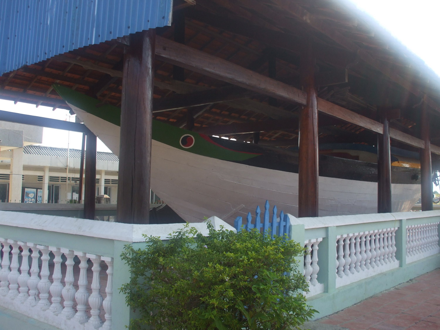 Tương truyền chiếc ghe này (có tên là Ghe Sấm, nay đã được sữa chữa) đã đưa Ông Trần cùng quyến thuộc từ Hà Tiên đến Bà Rịa-Vũng Tàu (Việt Nam) để khai hoang lập nghiệp vào khoảng năm 1891.